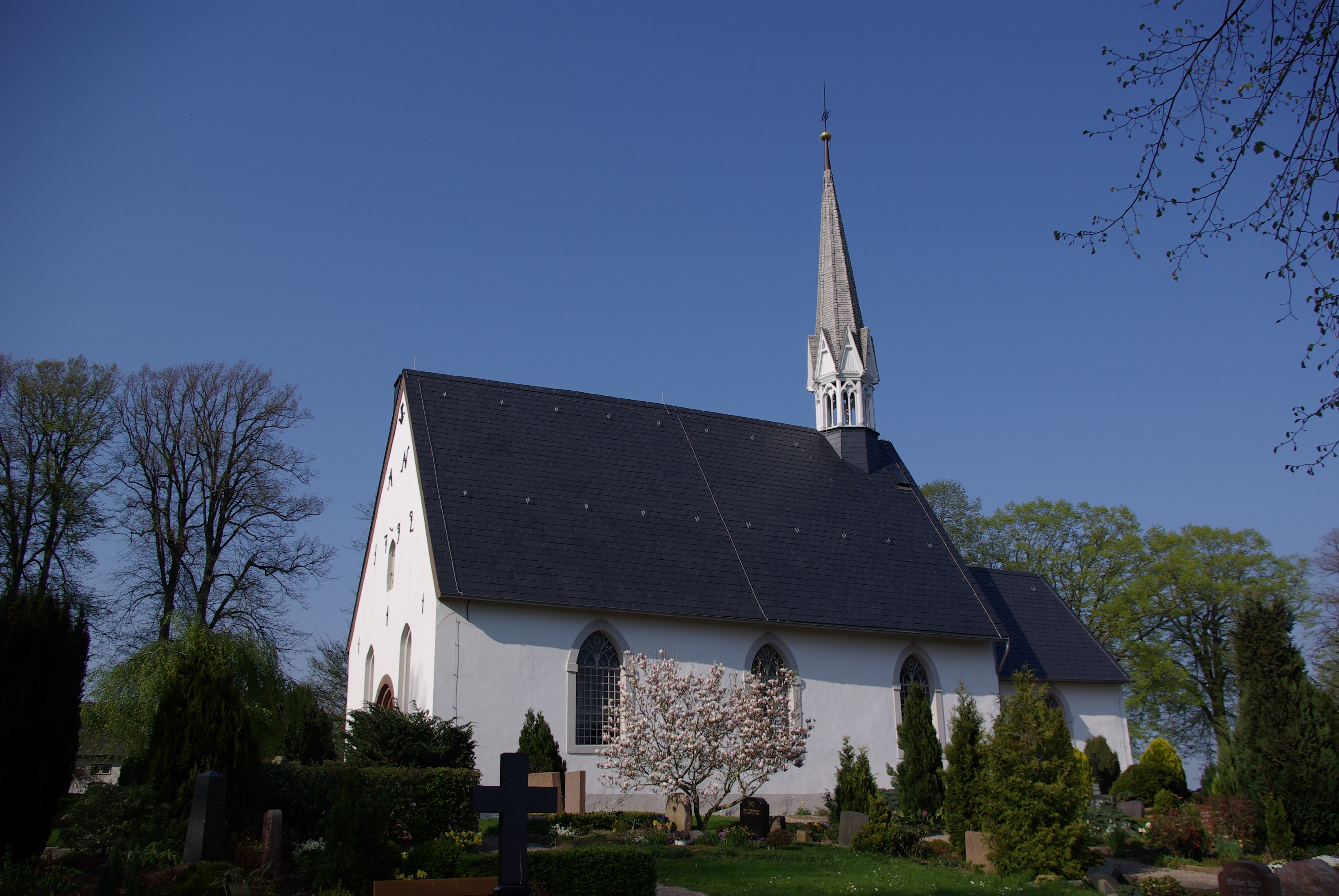 Oersberg, Ortsteil Toestrup in Schleswig-Holstein. Die Kirche steht auf dem Kirchhof, beides ist denkmalgeschützt.